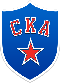 לוגו של סק"א סנקט פטרבורג